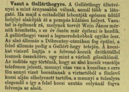 A Vasárnapi Ujság cikke egy tervezett Gellért-hegyi siklóról